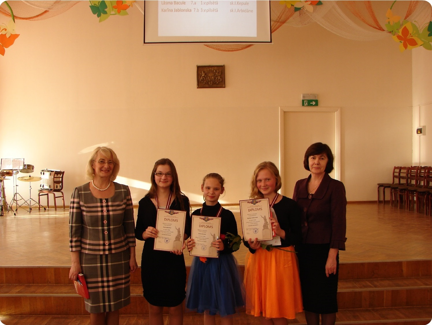 Veiksminieks 2016 - sk. Kepule un sk. Arbidāne